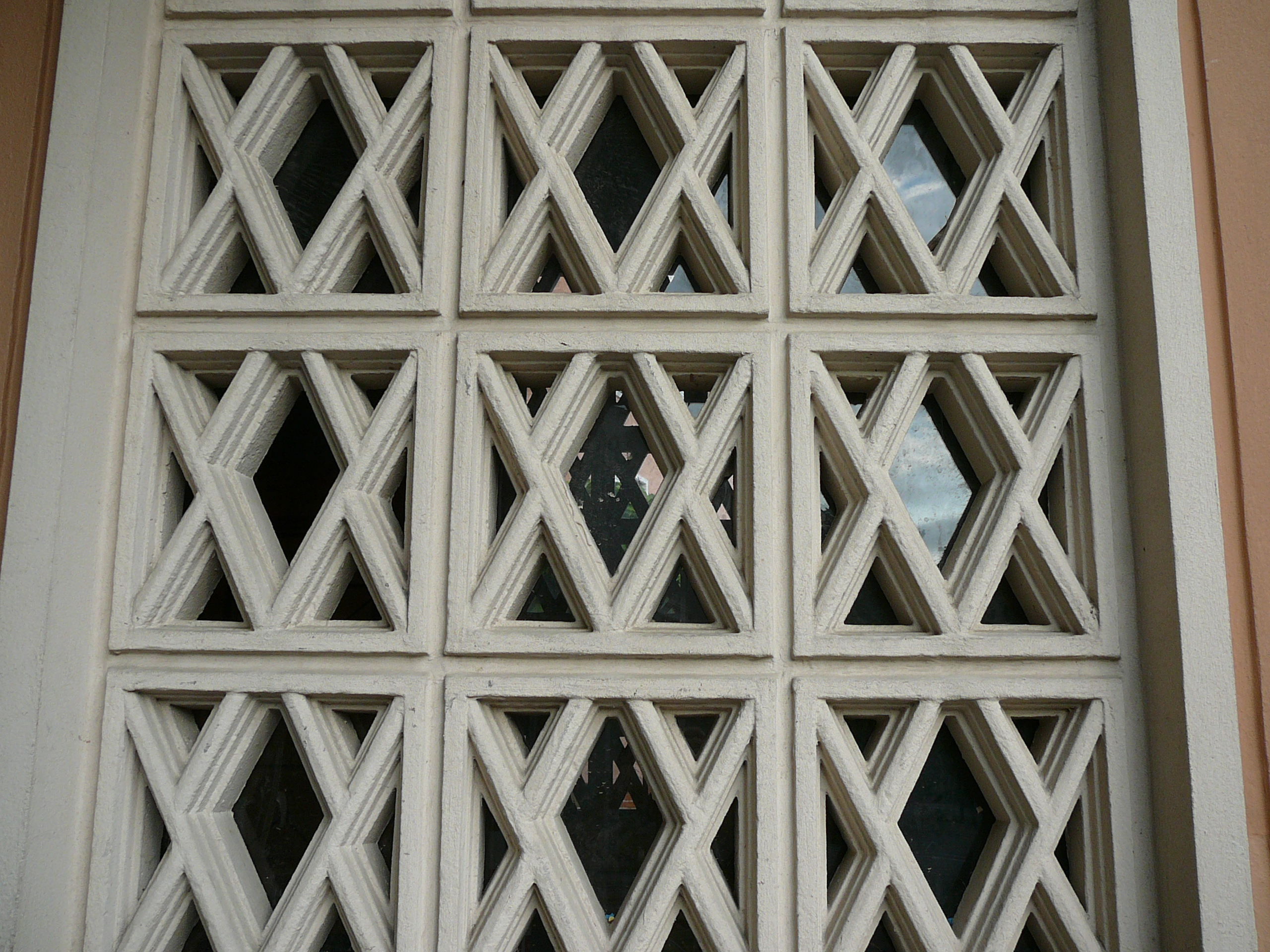 Römisch-katholische Kirche St. Konrad, Zürich-Albisrieden, Detail vom Turm